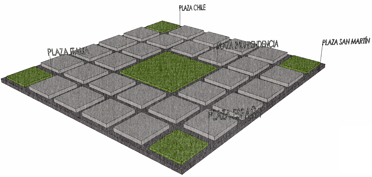 Distribución de la plaza España (Mendoza) y el ámbito completo de la plaza Independencia.